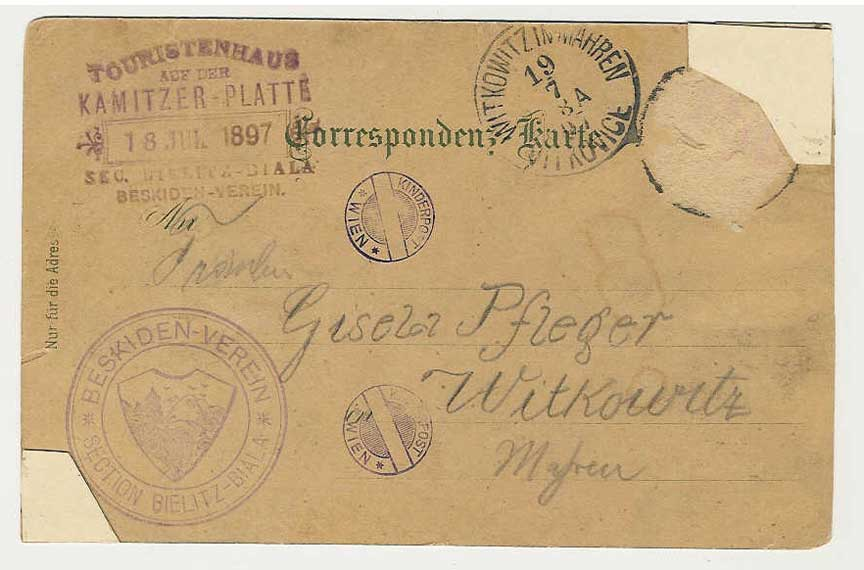 Alte Korrespondenzkarte von Kamitzer-Platte Kartka pocztowa z Szyndzielni (pieczątka Beskidenverein)